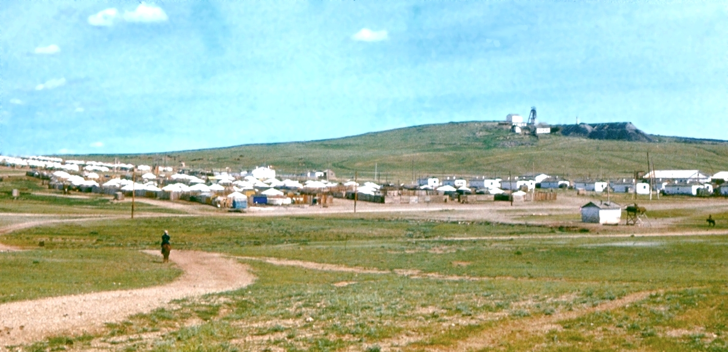 Der Ort Burenzogt 1977